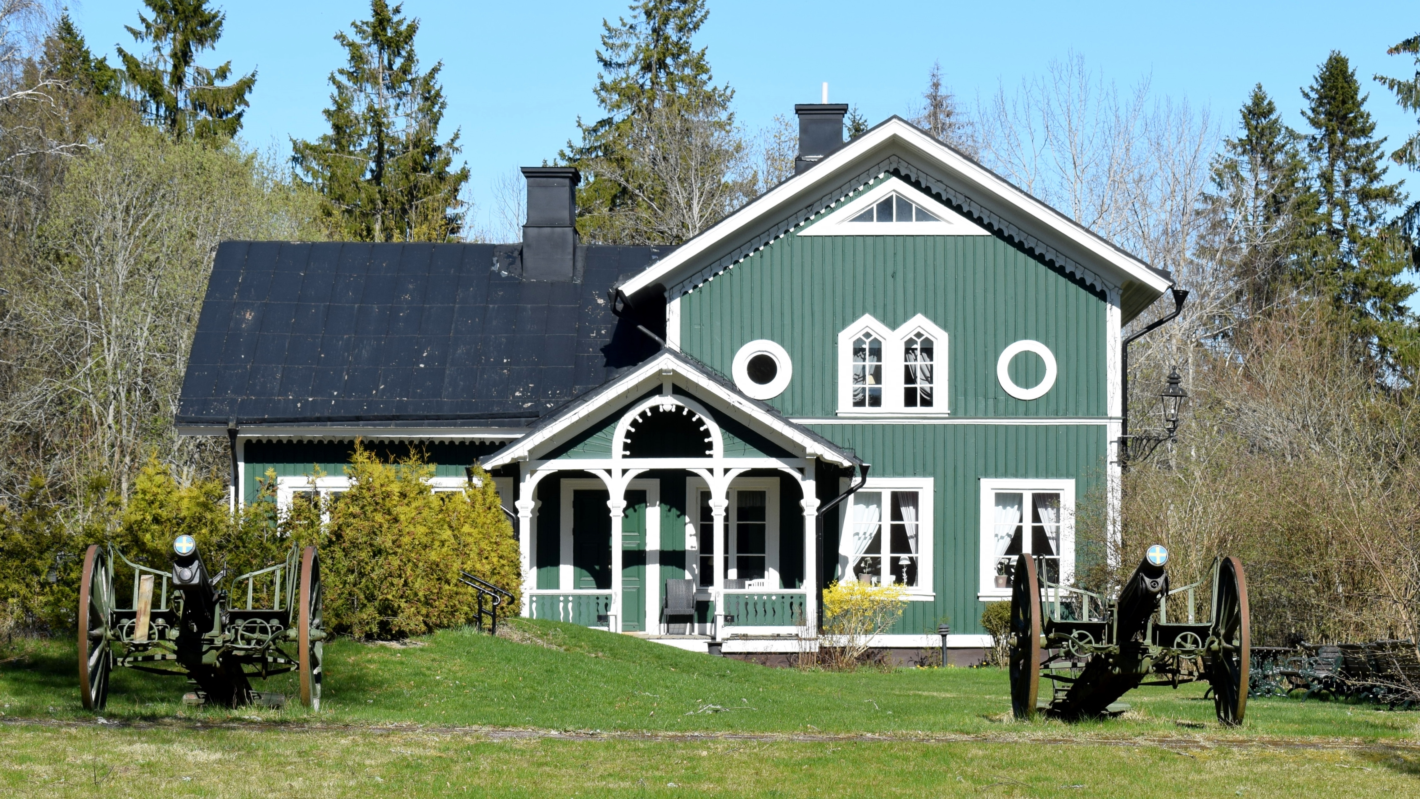 Plevnagården. Ett 1700-tals hus som ägdes och drevs som pensionat av Greta Garbos faster i Sparreholm. Där övernattade Greta Garbo när hon kom på besök till Sverige. Idag används den historiska byggnaden som hotell och till konferenser.